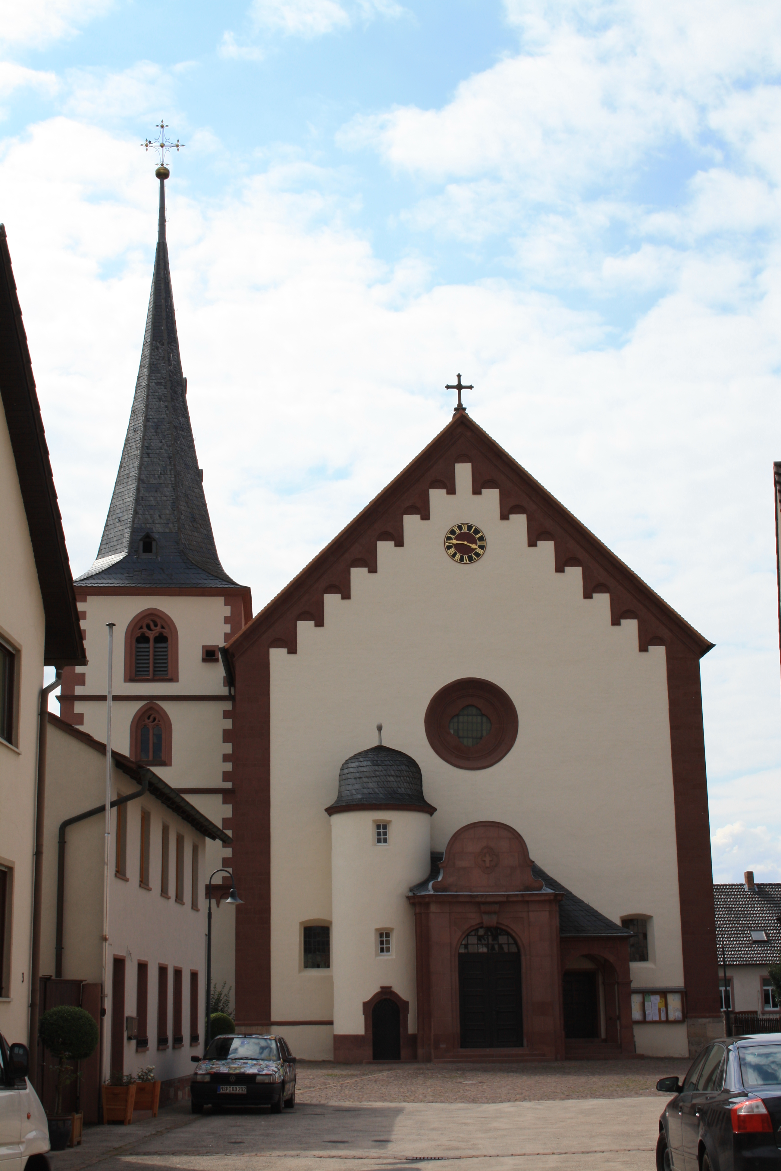 Kath. Pfarrkirche in Birkenfeld (Unterfranken)